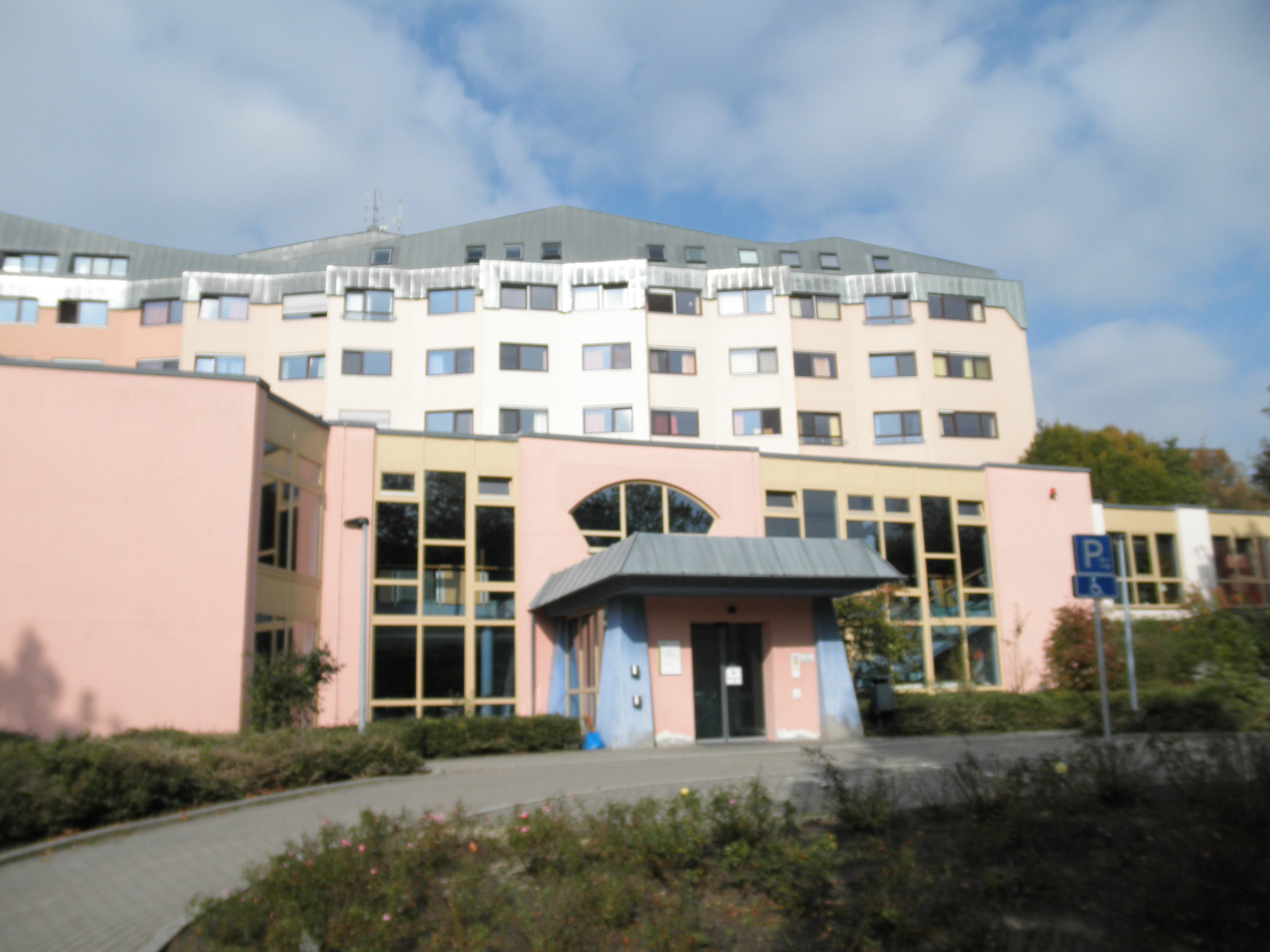 das antroposophische Gemeinschaftskrankenhaus Herdecke im Herbst 2010